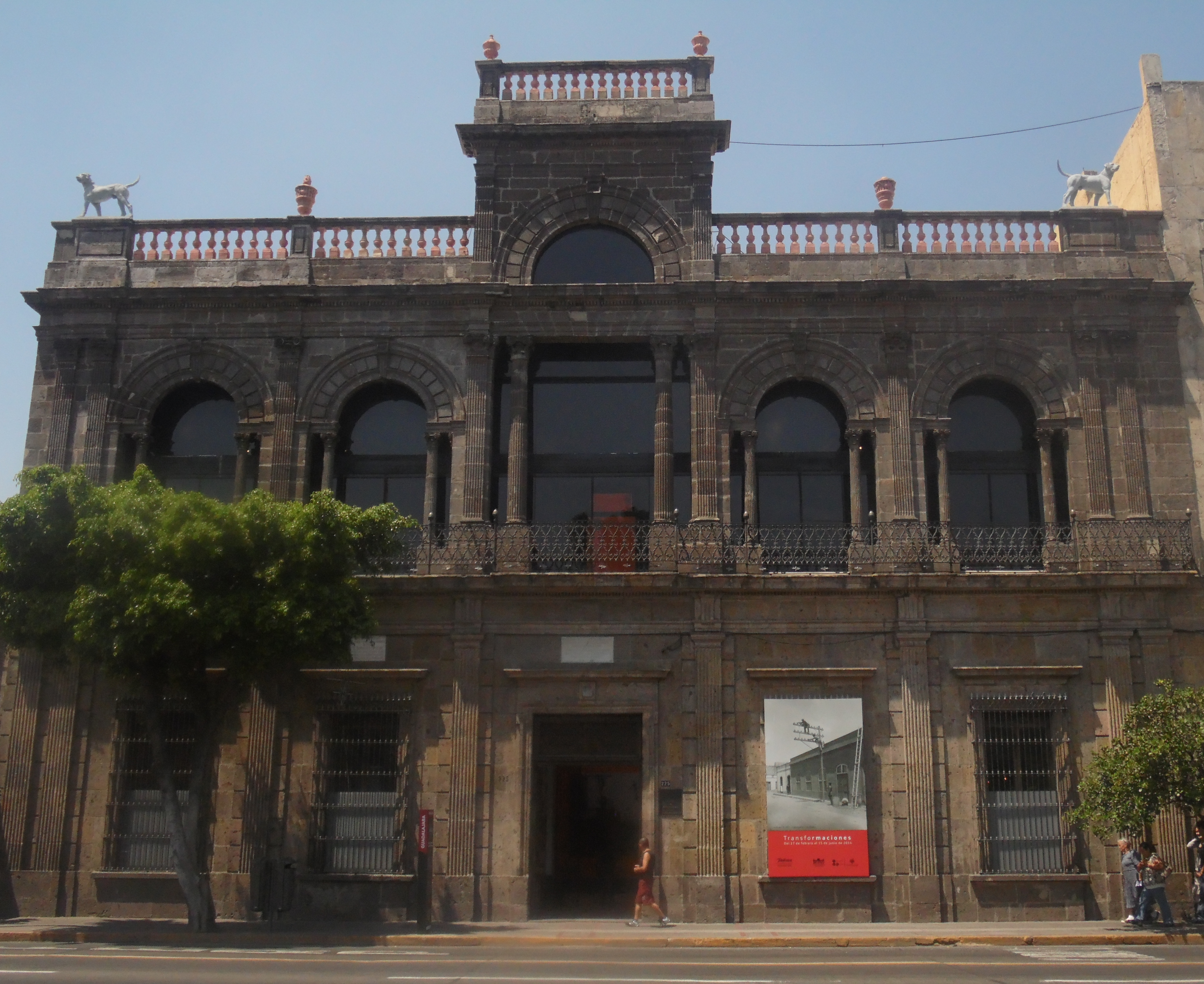 Centro Histórico de Guadalajara